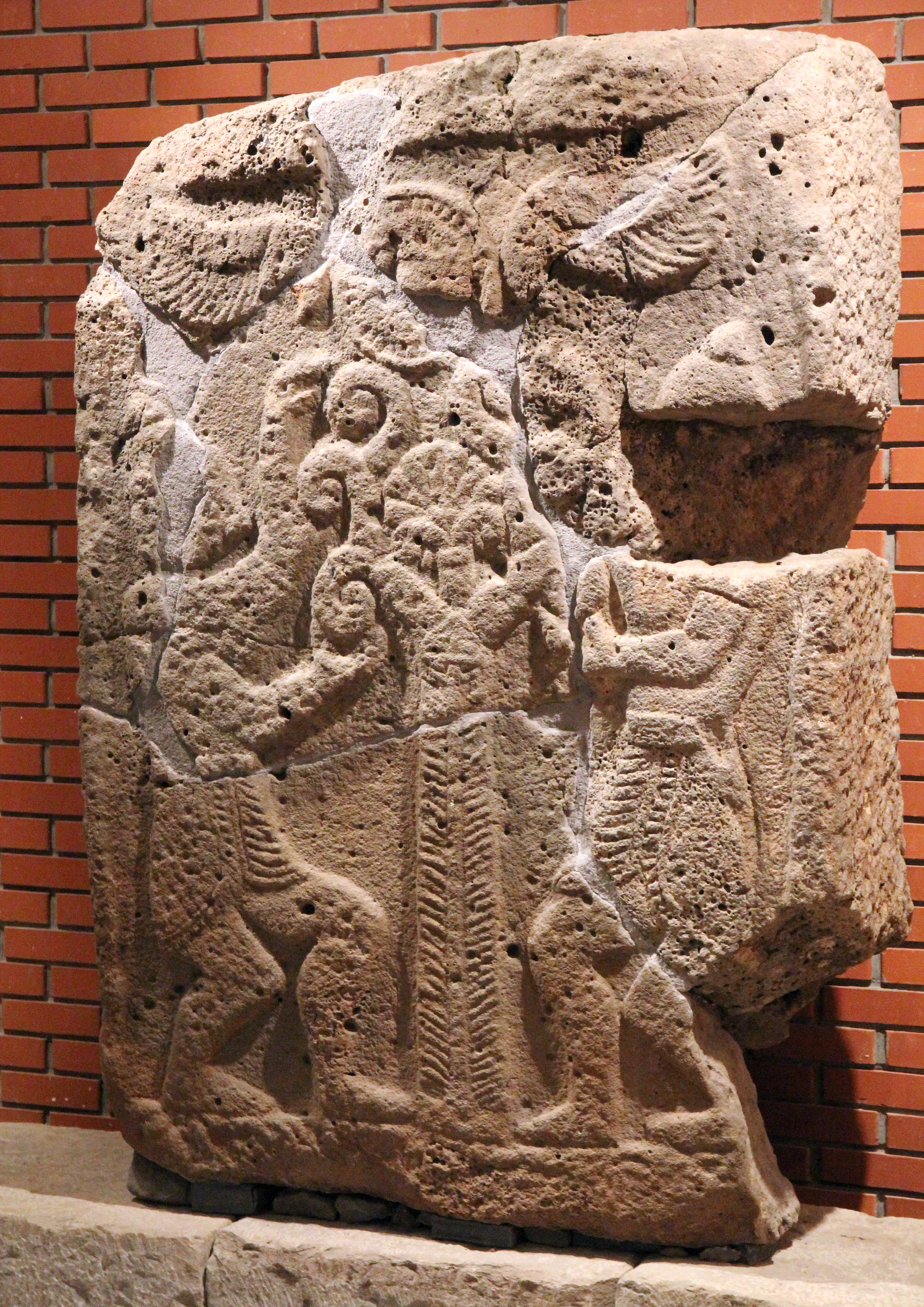 Orthostat vom Domuztepe, nahe Karatepe bei Osmaniye, Südtürkei, ausgestellt im lokalen Museum von Karatepe. Zwei Figuren (Götter?), die unter einer Sonnenscheibe um einen Lebensbaum tanzen. Wahrscheinlich aus einer Werkstatt von Karatepe